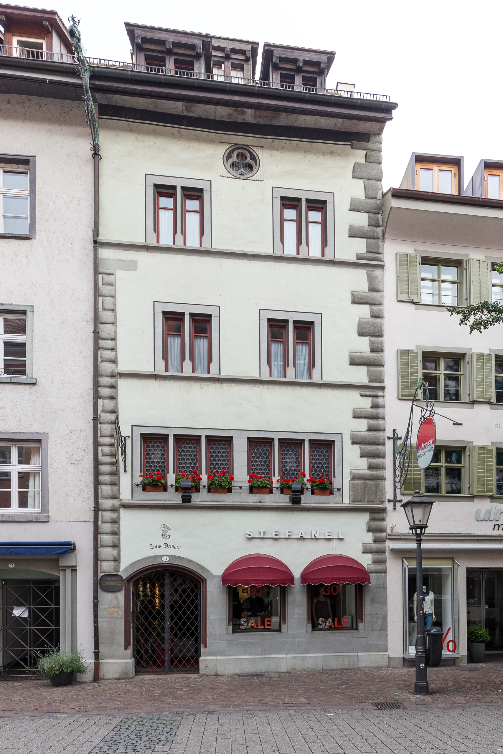 "Zum Delphin" Hussenstr. 14, Konstanz